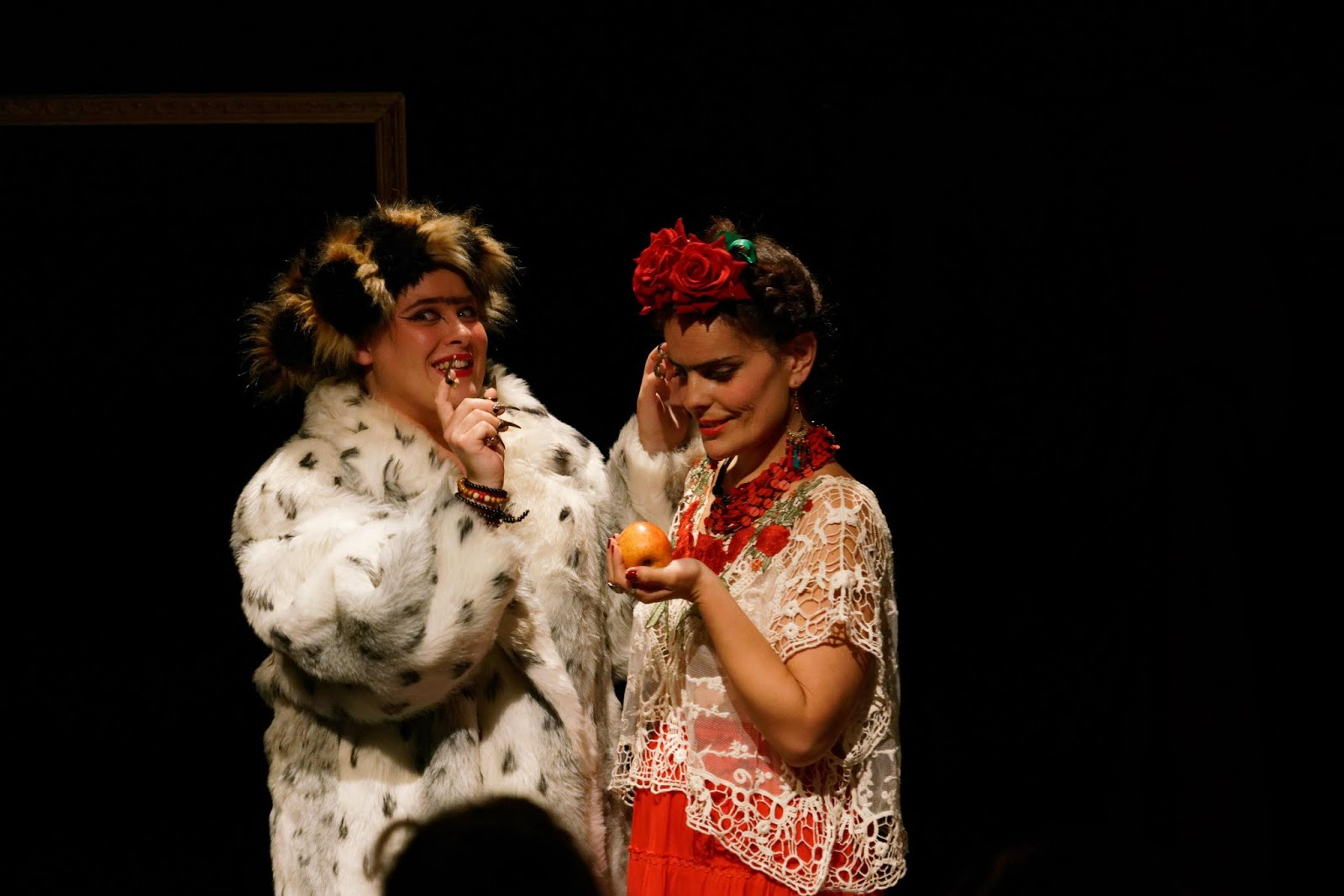 Espectáculo Não Kahlo, das Produções D. Mona.